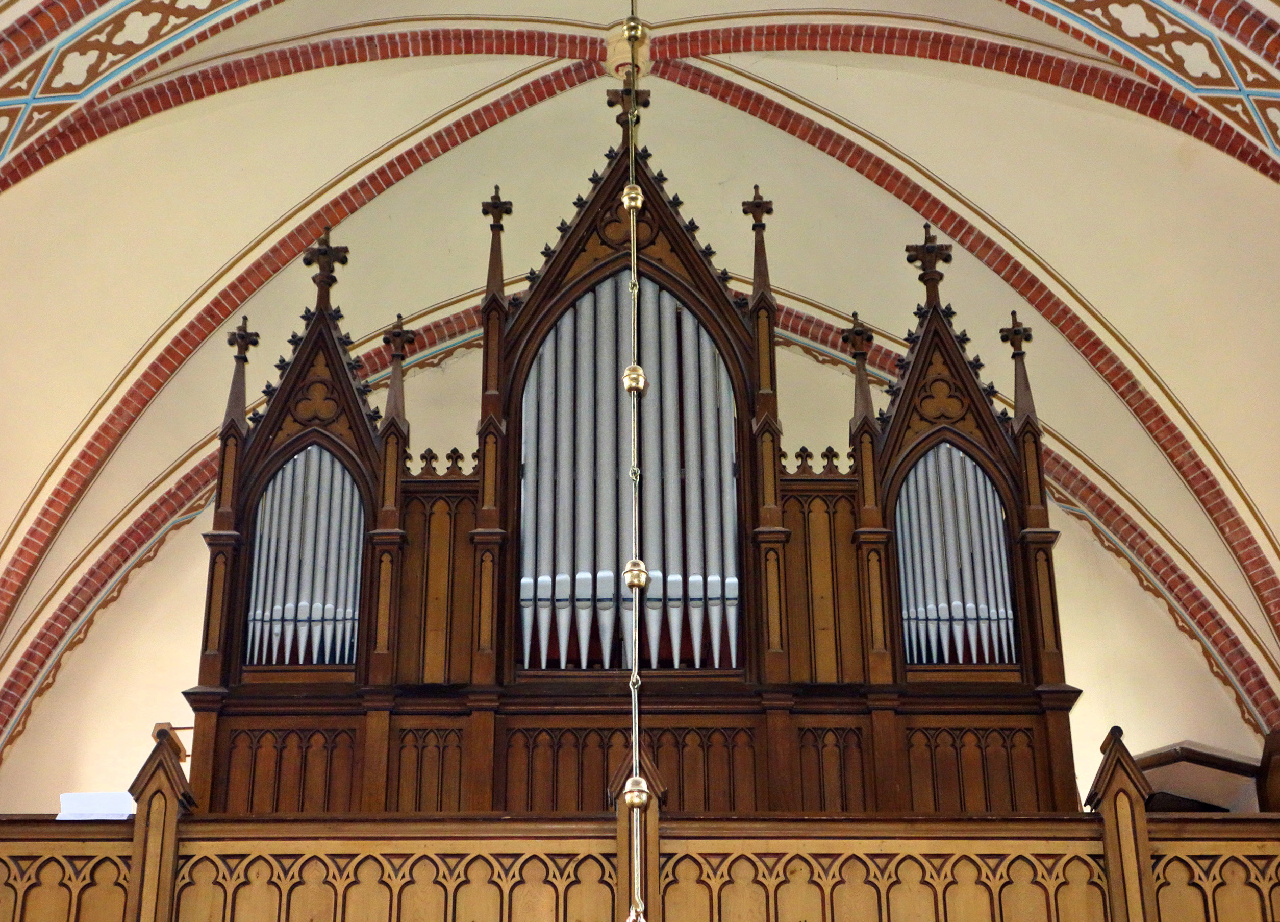 Orgel in Carlow, Mecklenburg-Vorpommern